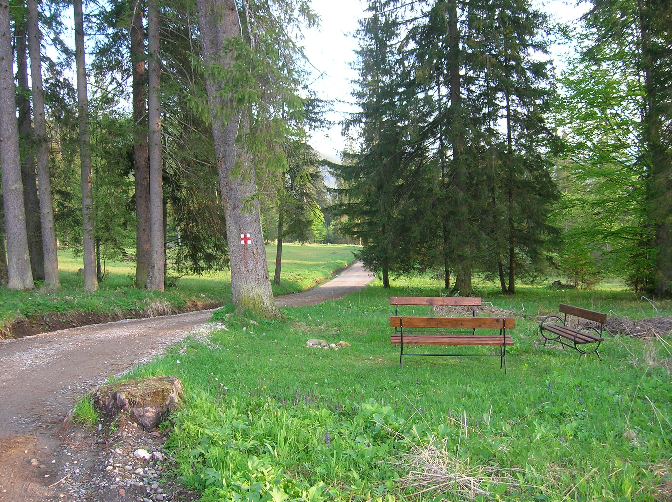 Din Rezervaţia Scaunul Rotund